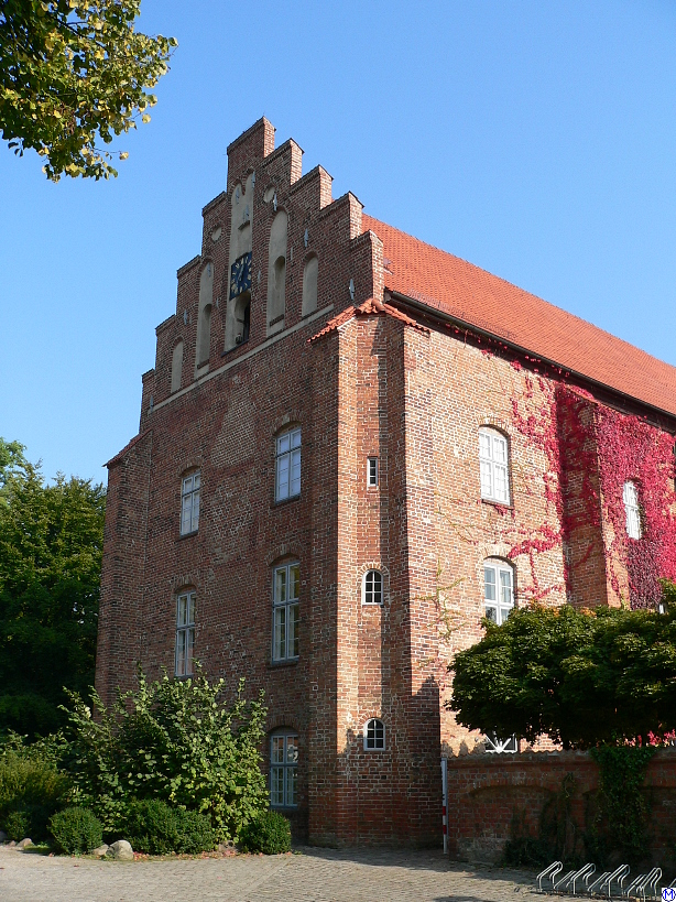 Westfront des Klosters Cismar in Ostholstein